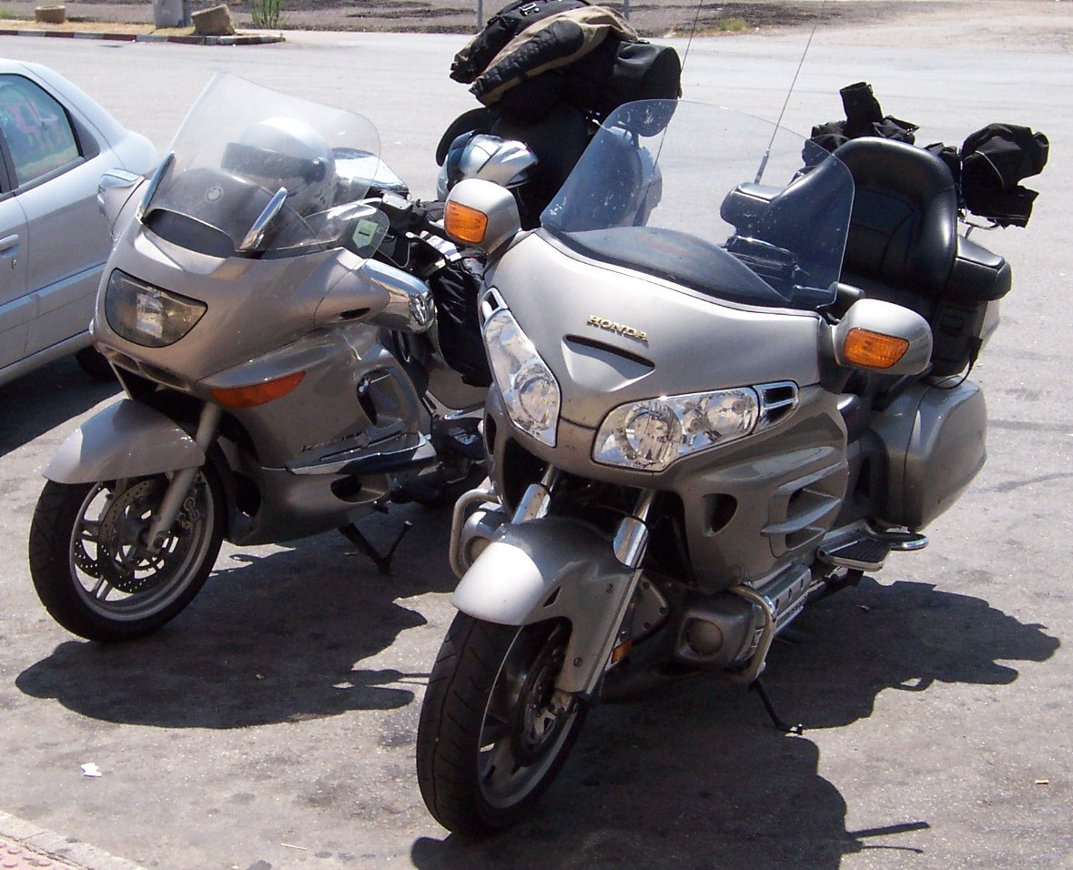 Honda Goldwing e BMW K1200 LT